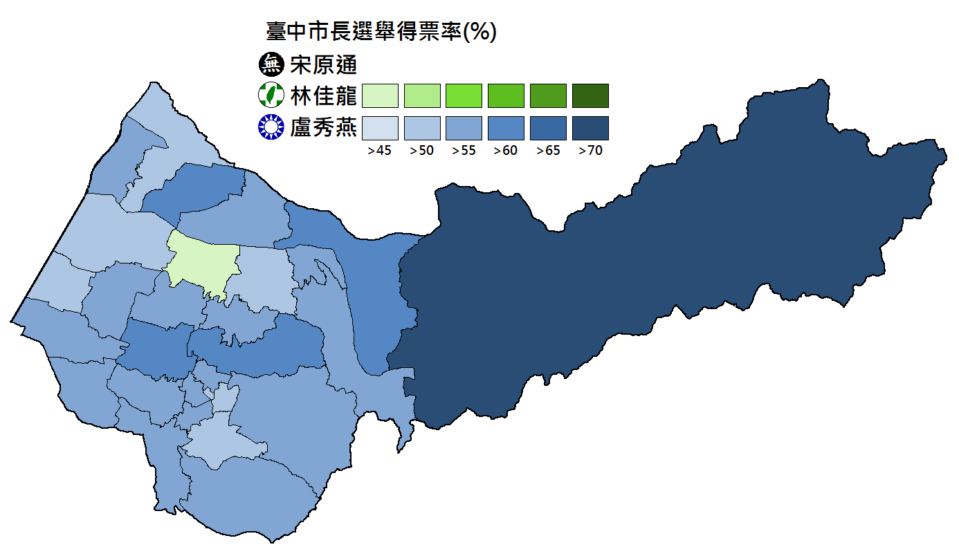 臺中市長選舉得票分布。